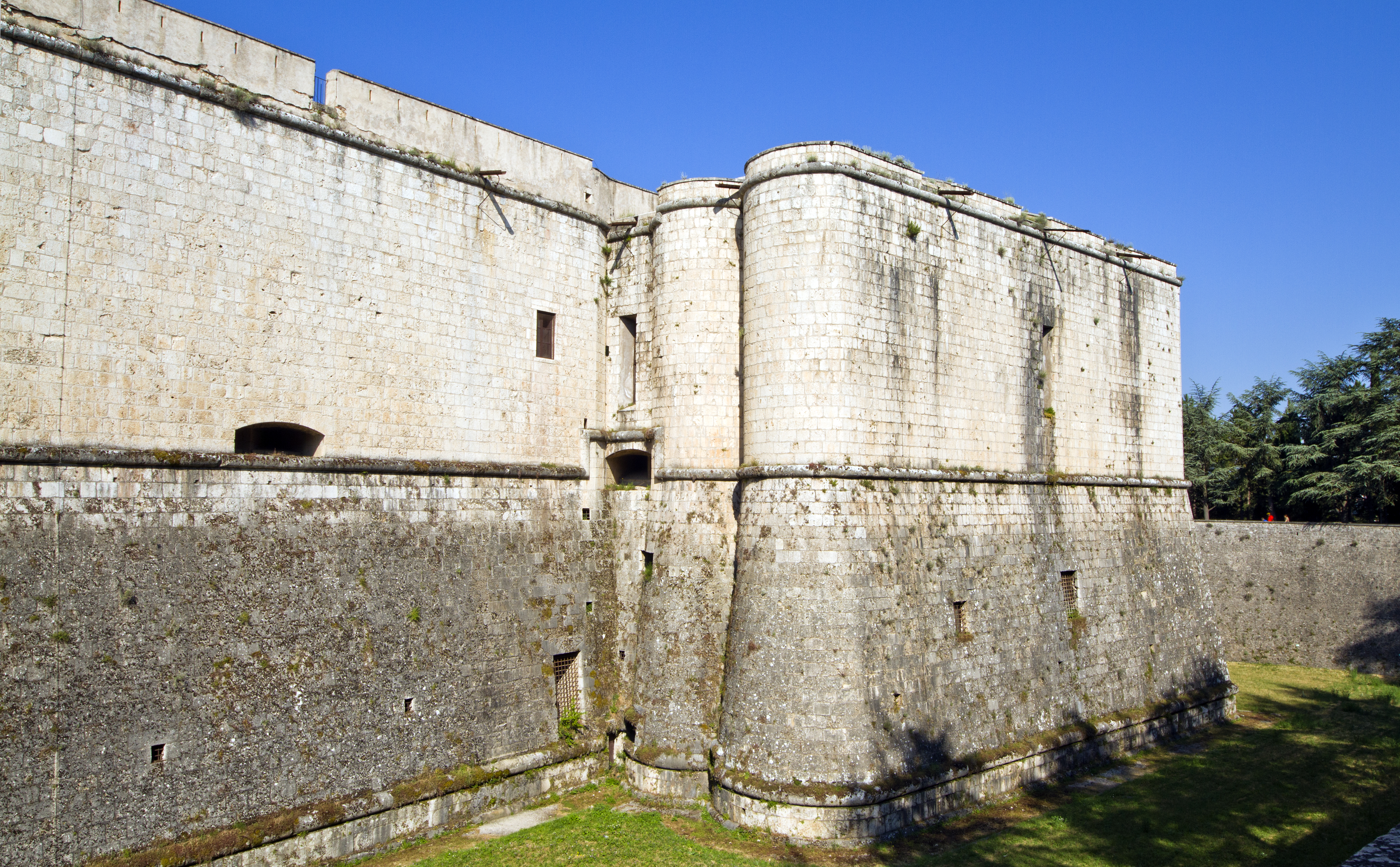 67100 L'Aquila, Italy